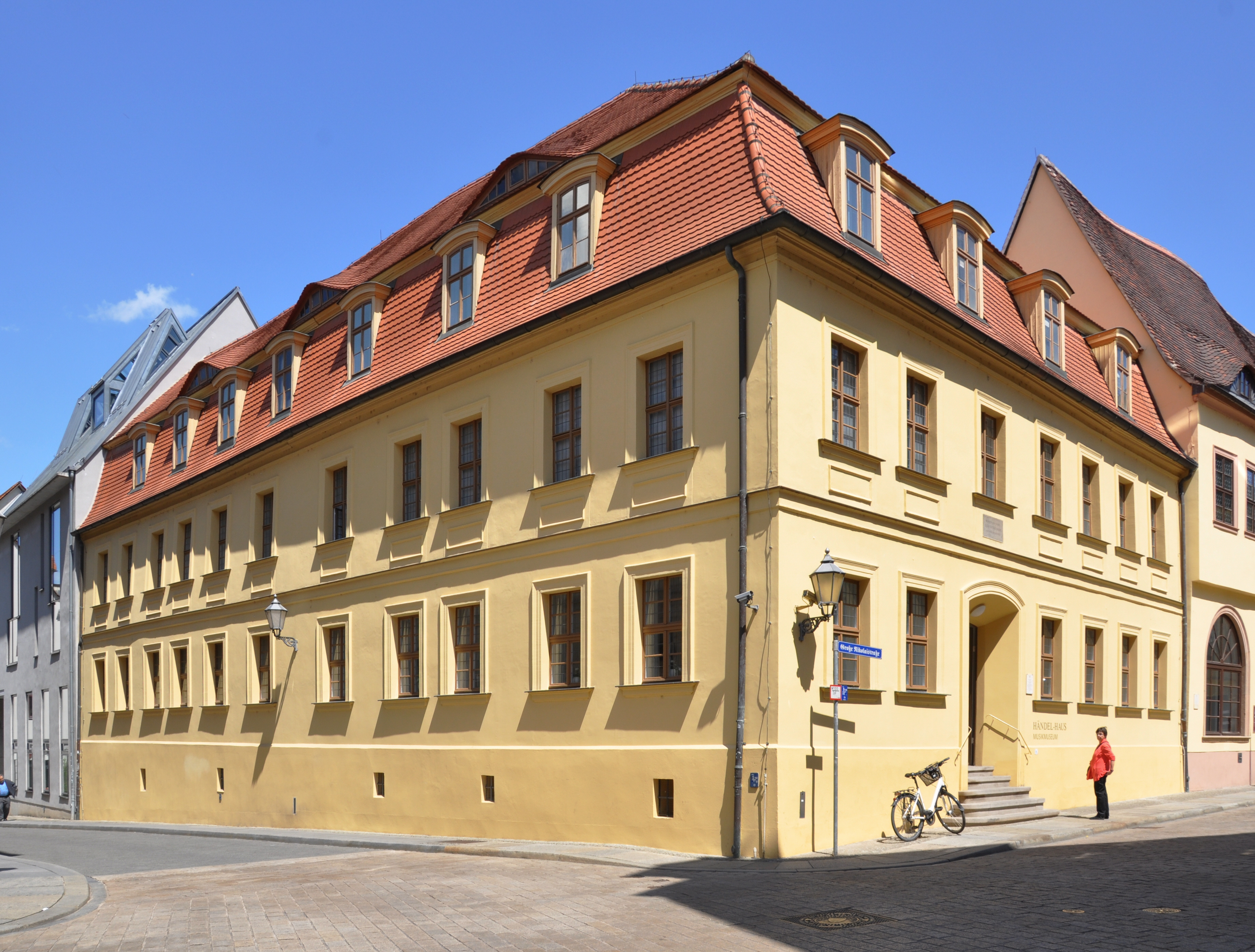 Halle (Saale), Händelhaus Halle